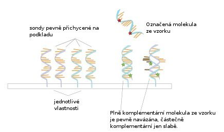 Schéma microarray experimentu s českým popisem.